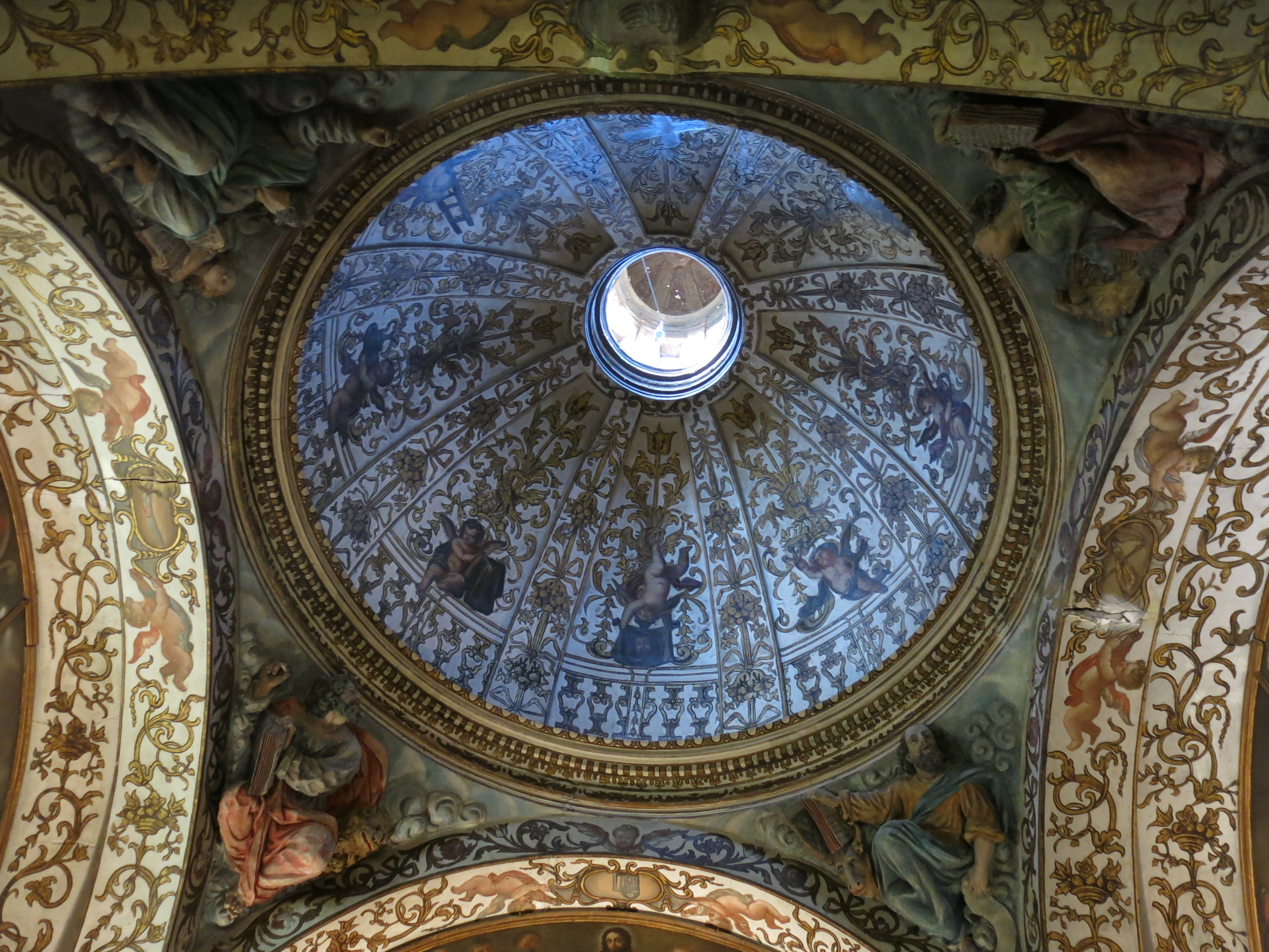 Església parroquial de Santa Maria (Salomó)